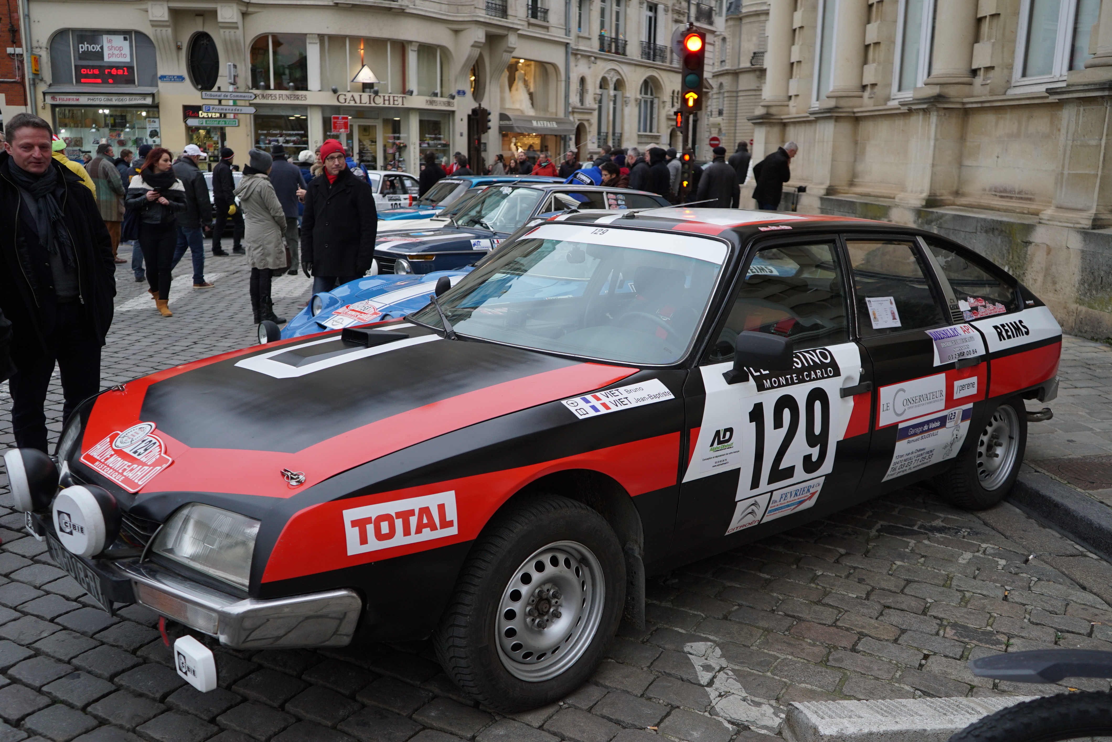 lors du Rallye Monte Carlo Historique de 2016